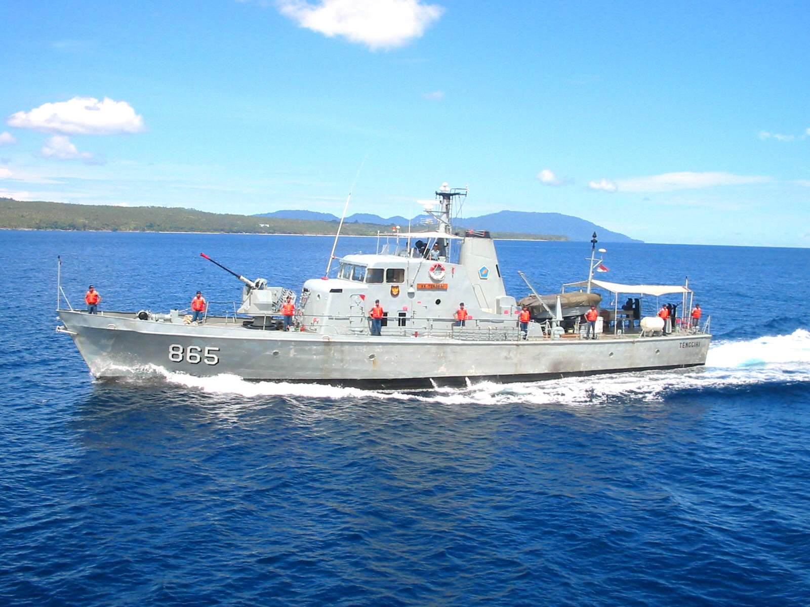 KRI Tenggiri melintas di Selat Singapore menuju Batam